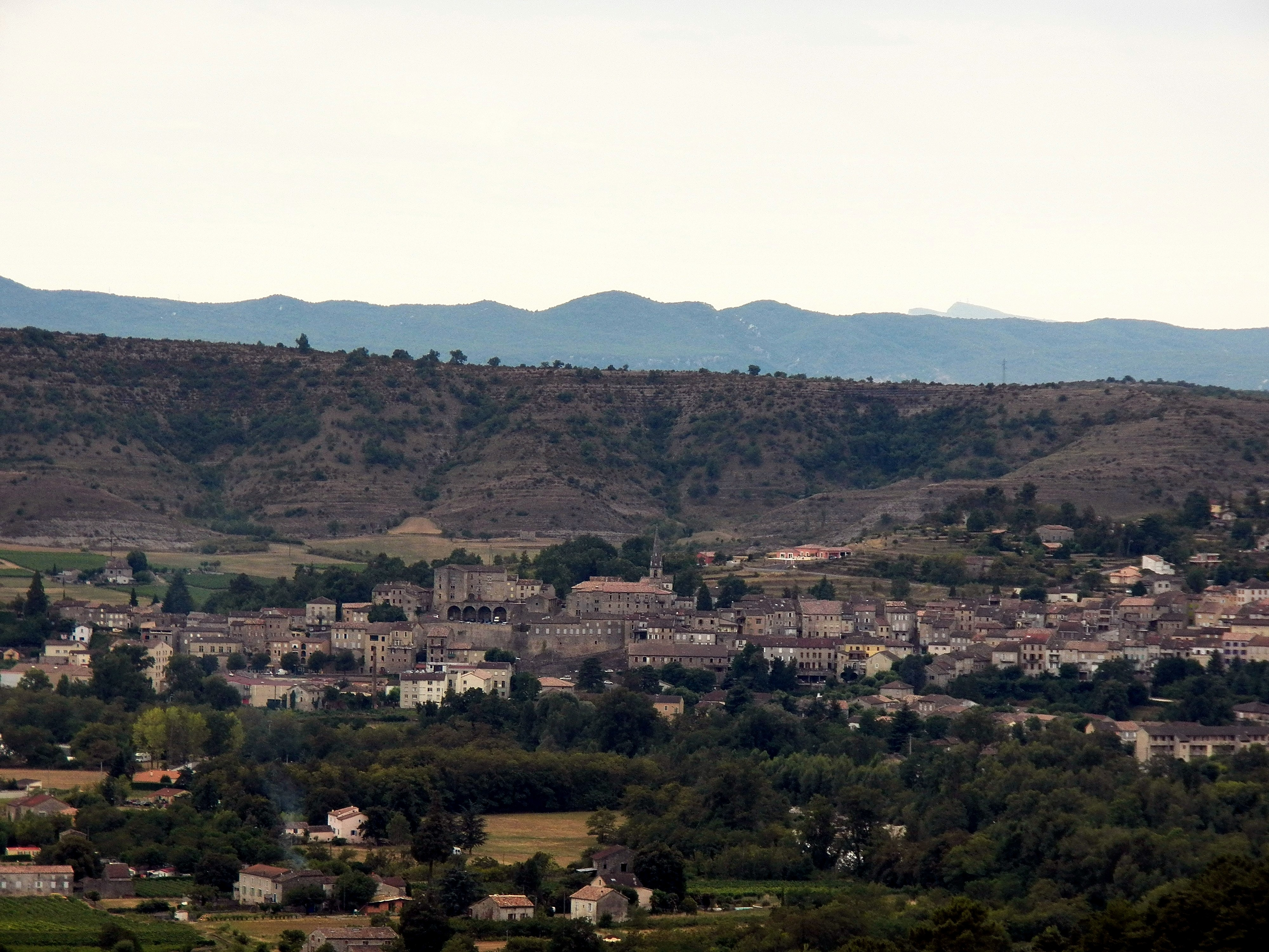 Photo de Joyeuse prise depuis les côtes de Vernon.